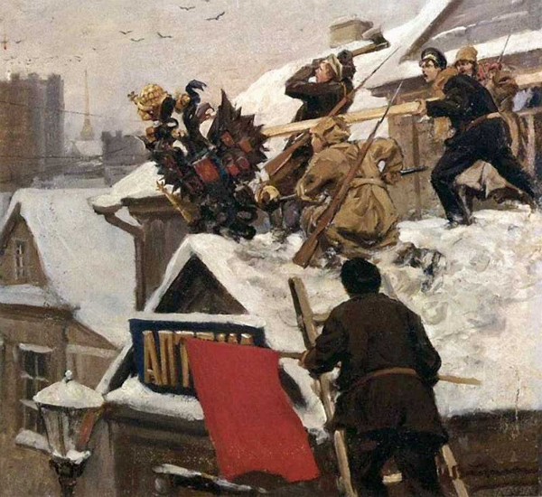 «Долой орла!», картина И. А. Владимирова.